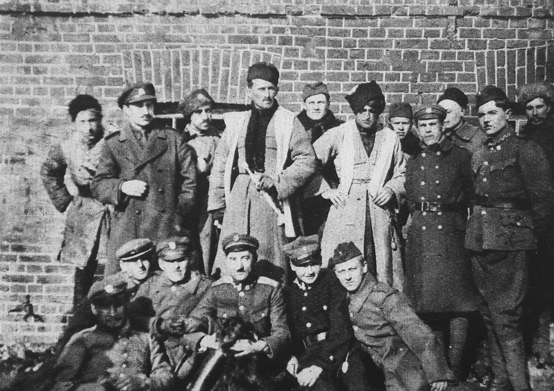 Генерал Булак-Булахович с подчиненными после переправы через Двину.